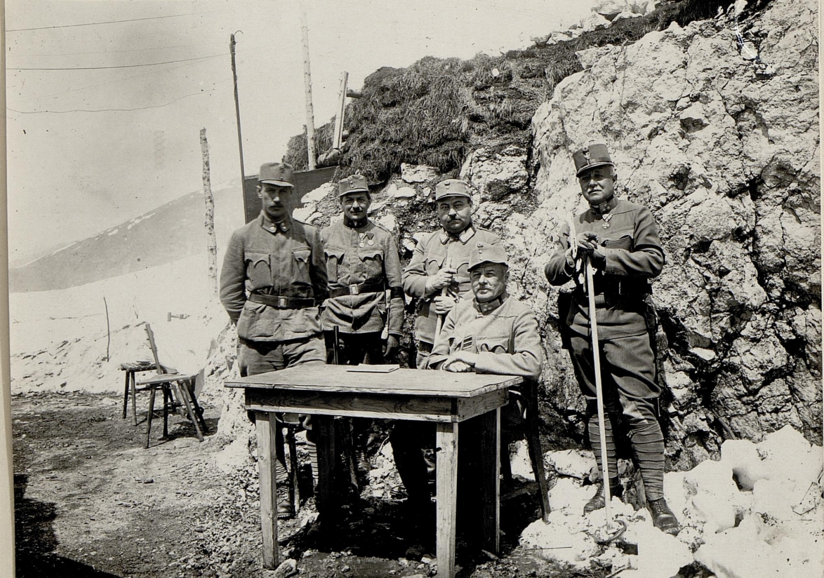 Ezxellenz Feldzeugmeister von Scheuchenstuel auf Biaena